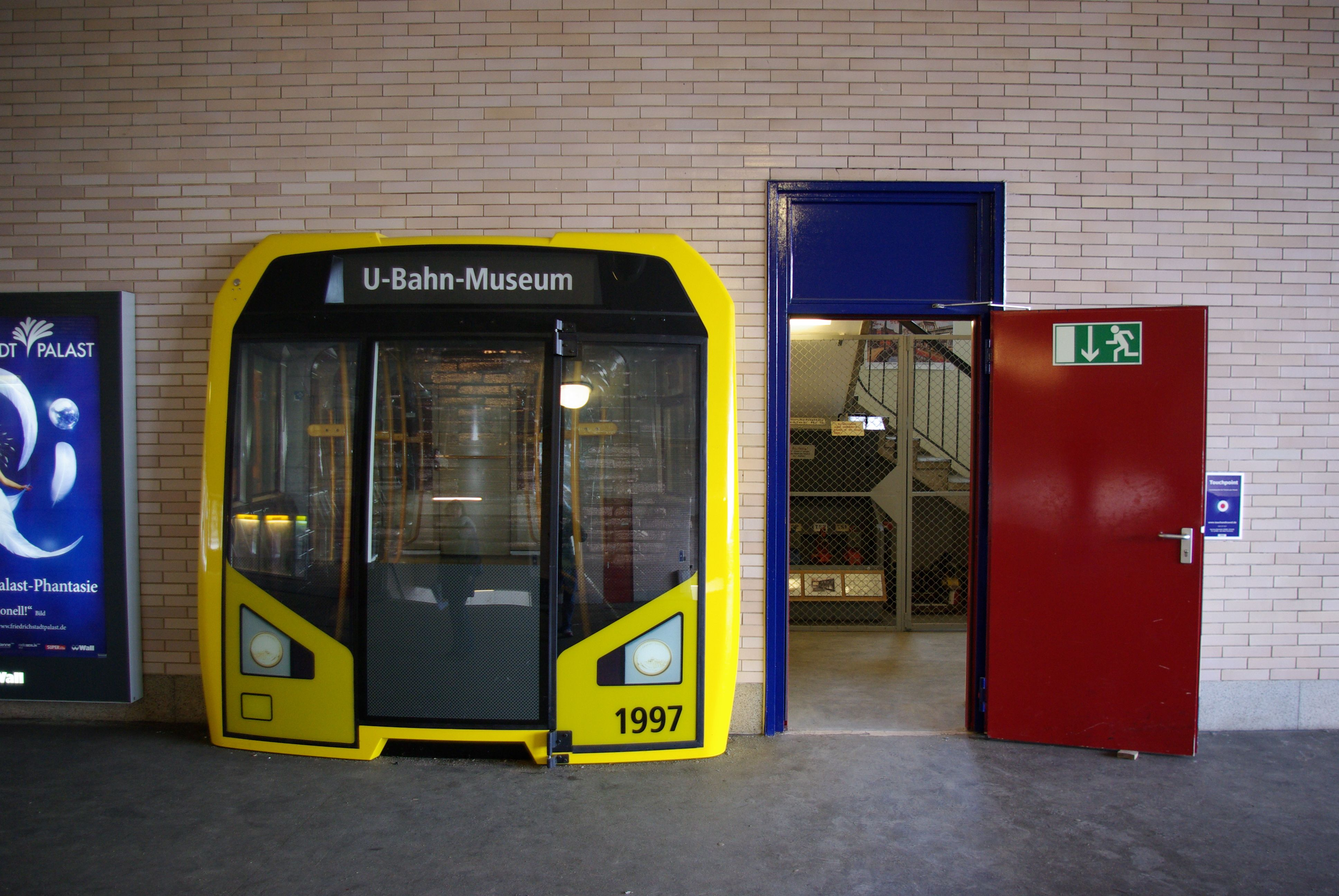 Berlin. Der Eingang des U-Bahn Museums in Berlin. Das Museum liegt in der U-Bahn-Station Olympia Station in einem alten Stellwerk.